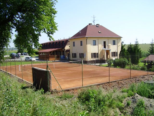 Penzion Nový Rybník stojí na místě bývalé vladyčí tvrze.